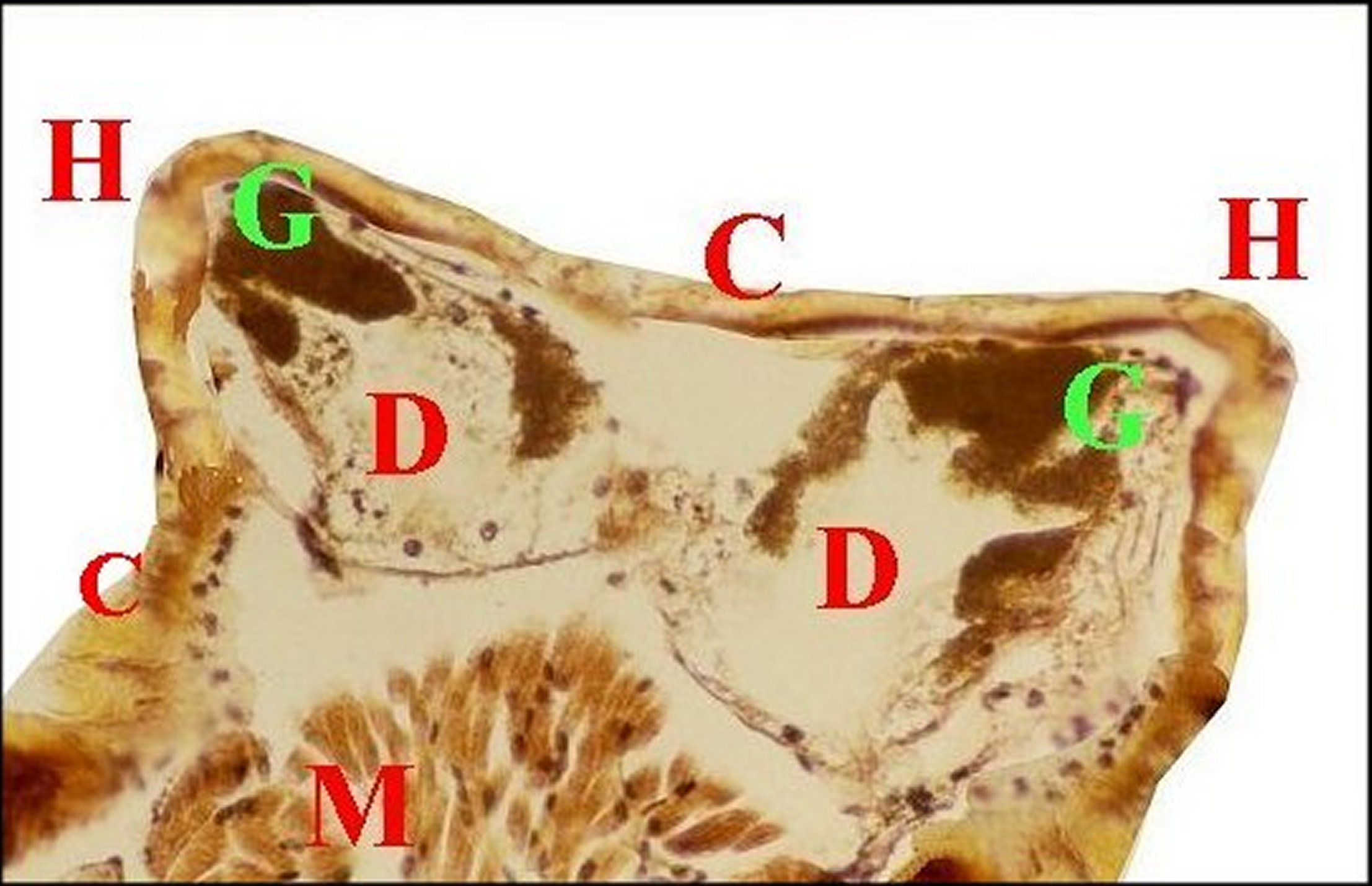 Coupe histologique passant par les deux cornes d'un mâle de Mastophora renfermant des diverticules intestinaux.